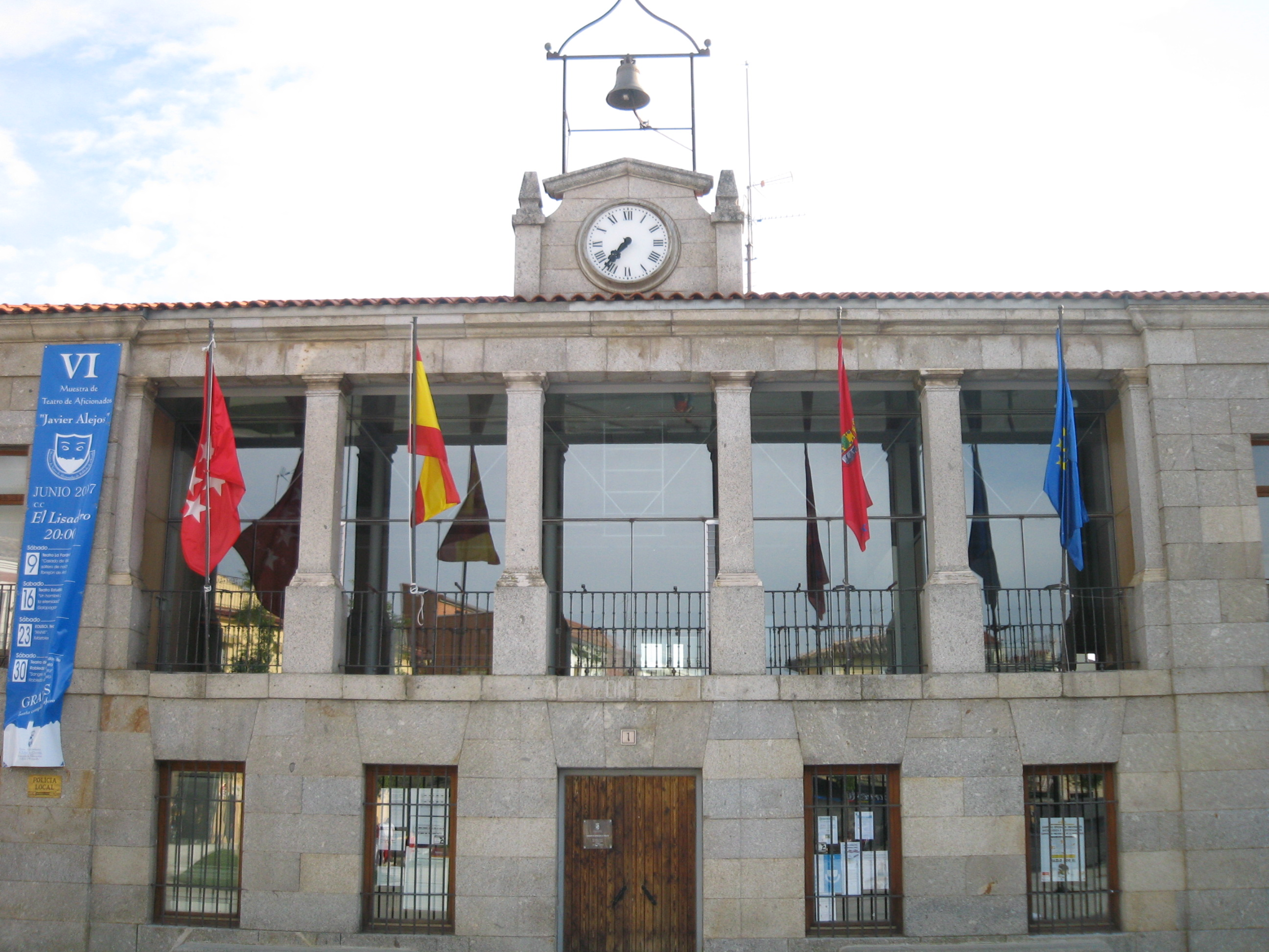 Robledo de Chavela